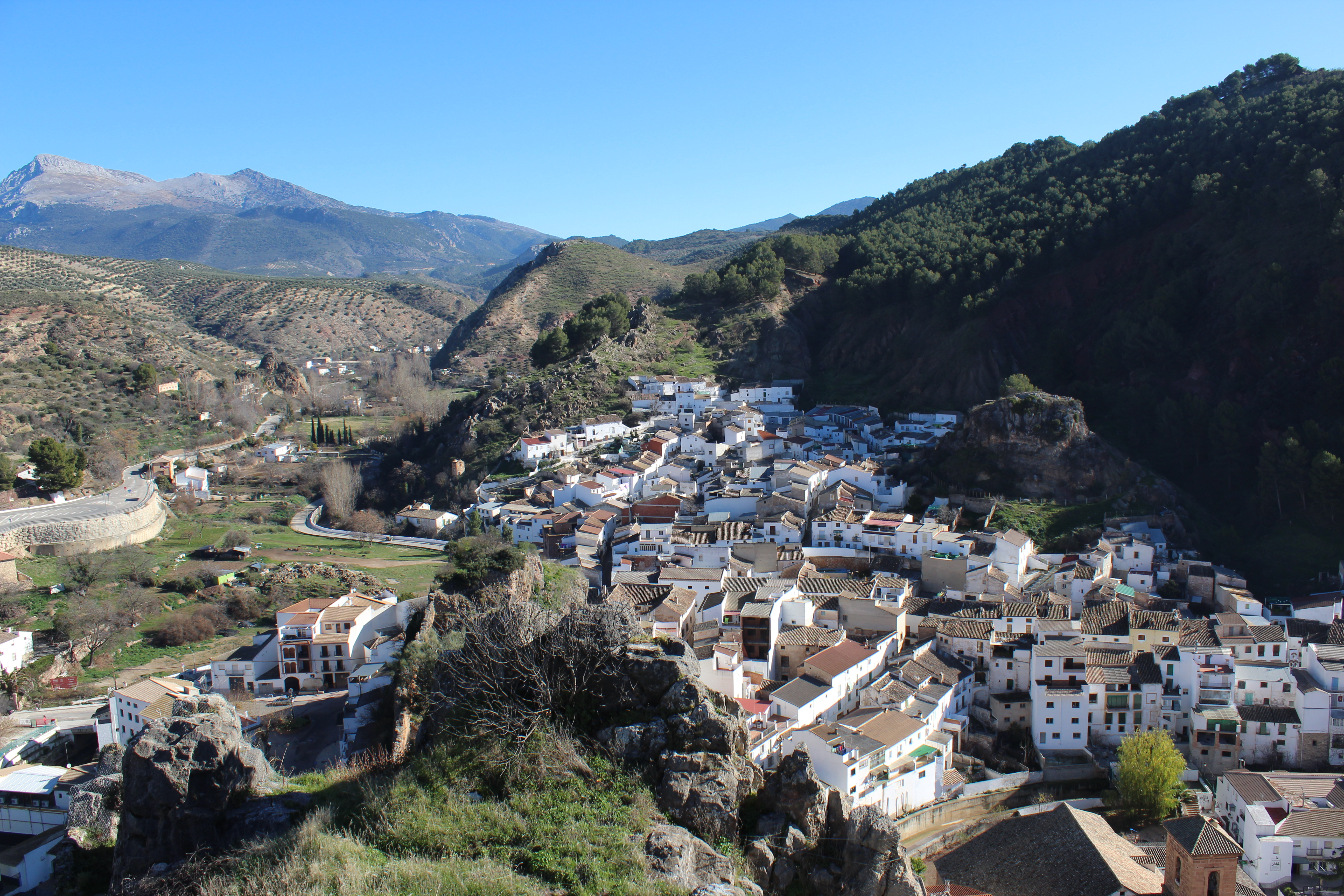 Vistas desde el alcazarejo del Castillo de Cambil.